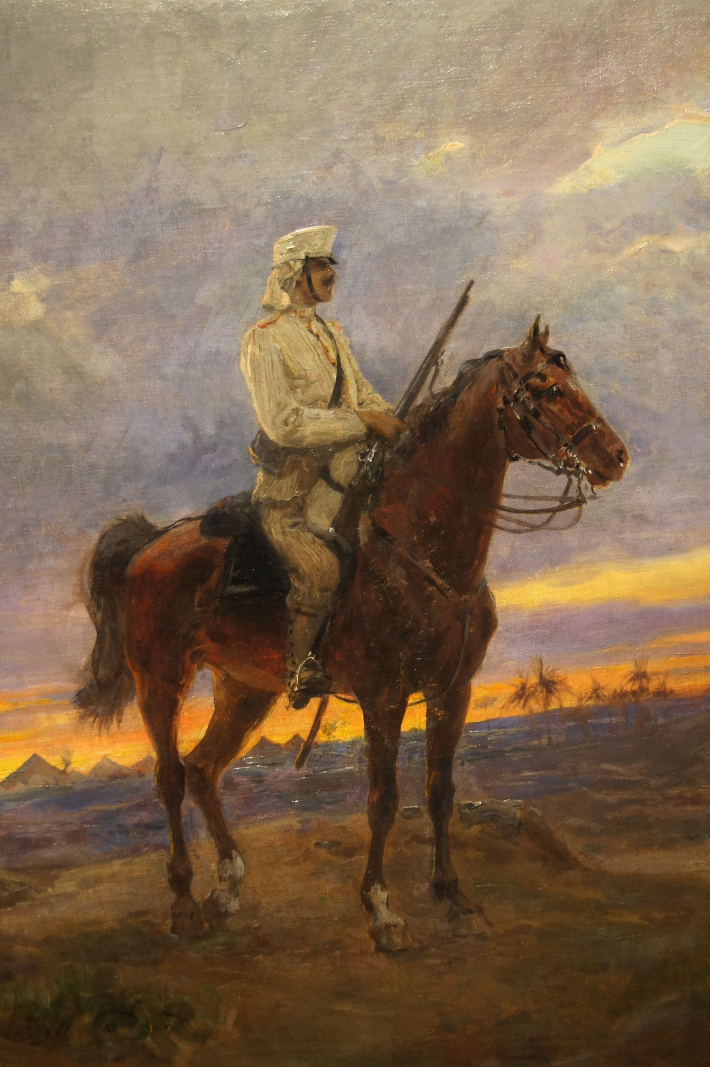 Centinela a caballo. Óleo sobre lienzo. 55.5 x 46.5 cm. Ulpiano Checa. 1909. Firmado y fechado ángulo inferior izquierdo. U. Checa. Agosto 1909. Esta obra fue pintada por Checa para una rifa a beneficio de los reservistas de Colmenar de Oreja en la guerra de África. El agraciado del sorteo fue don Martín Muñoz Hemández, quien donó el cuadro al Museo en 1960. Museo Ulpiano Checa. Donación de don Martín Muñoz Hernández. 1960